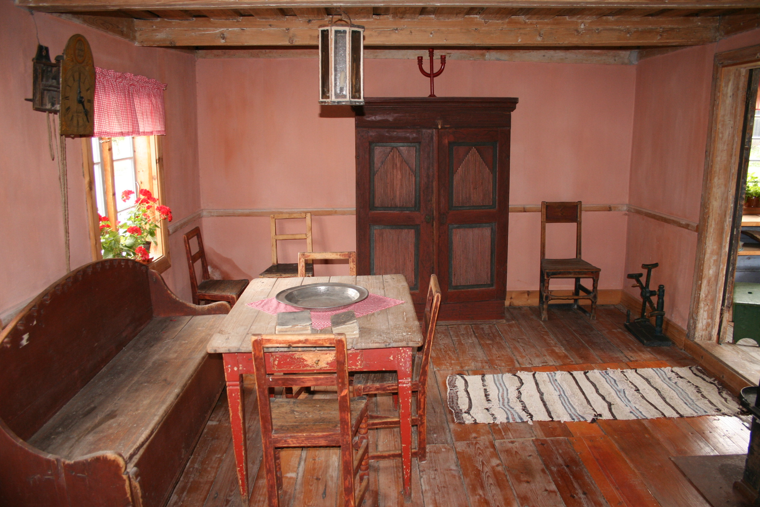 Stuen i en arbeiderbolig på Blaafarveværket.